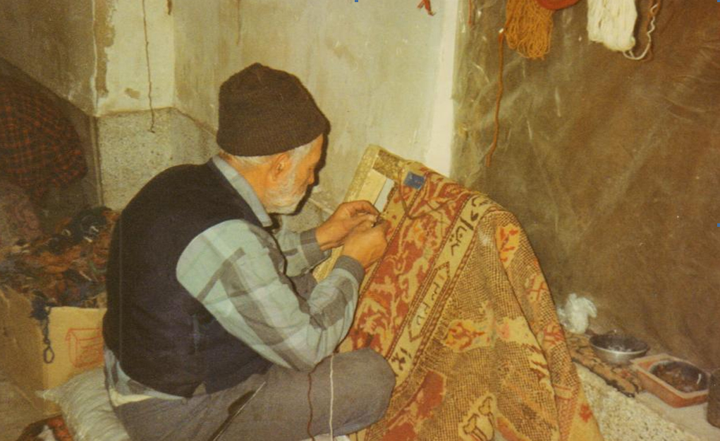 استاد اصغر در حال روفوي فرش مشروطه